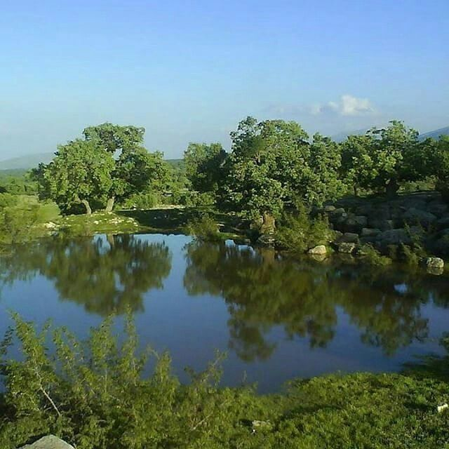 تفریگاههای طبیعی آسمان اباد